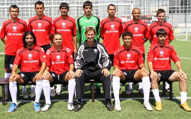 ФК Габала (Азербайджан)